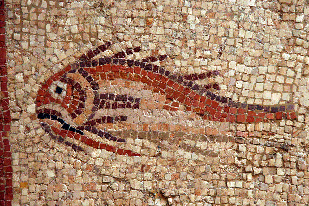 Mosaico de los peces de La Pineda. Detalle. Museu Nacional Arquelògic de Tarragona (MNAT)